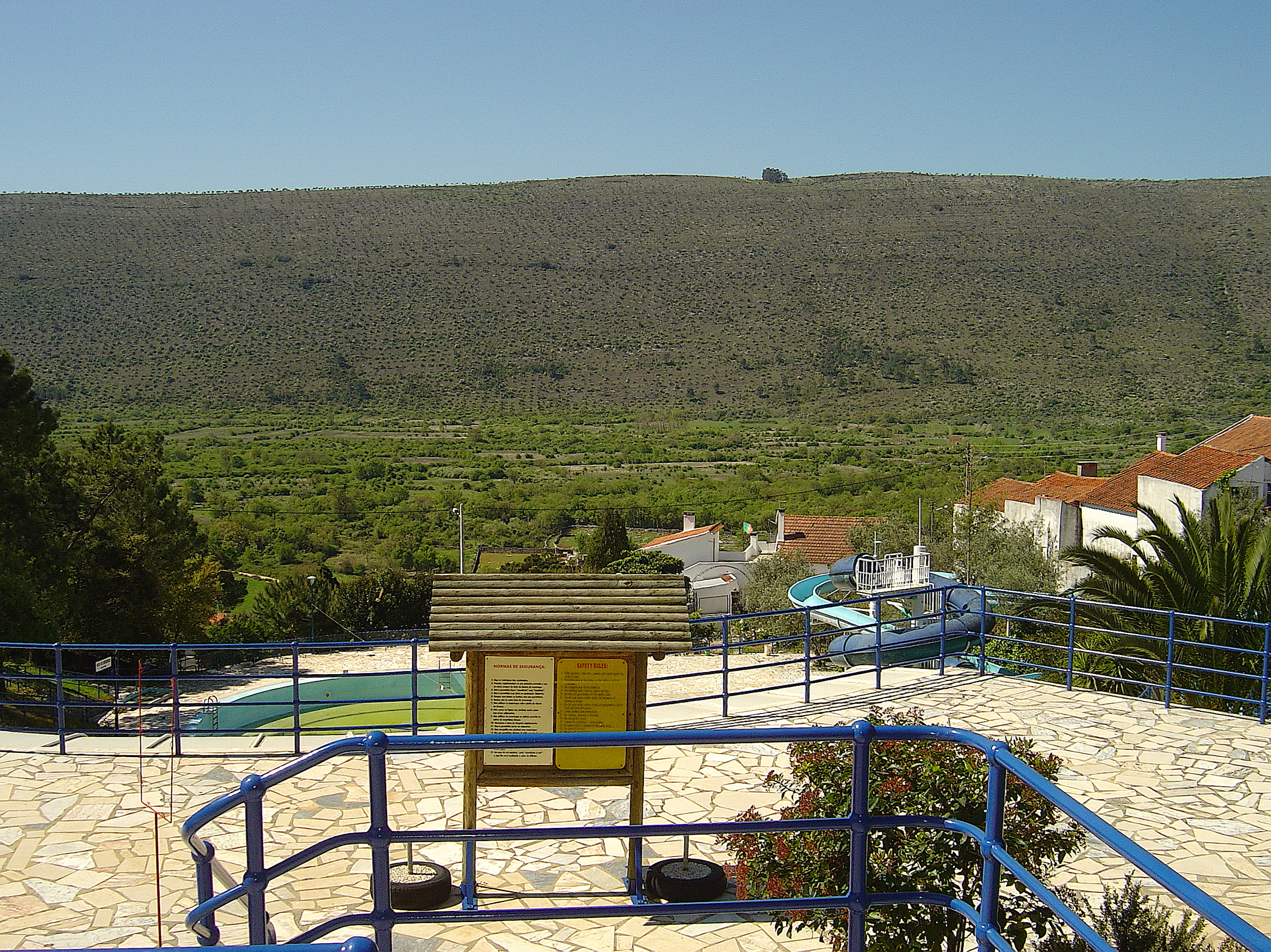 Integrado no Parque Natural das Serras de Aires e Candeeiros.